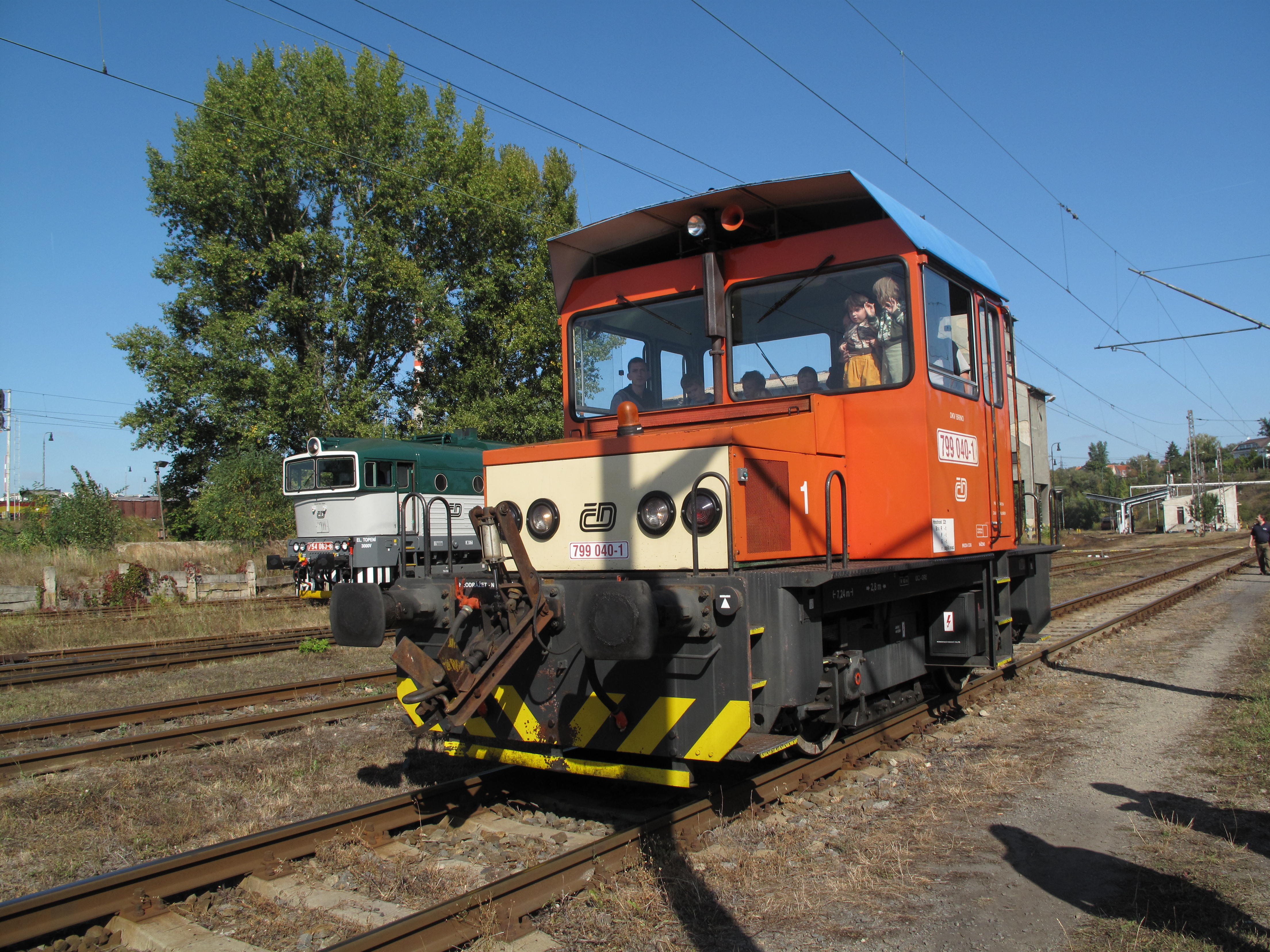 Lokomotiva 799 v depu v Maloměřicích